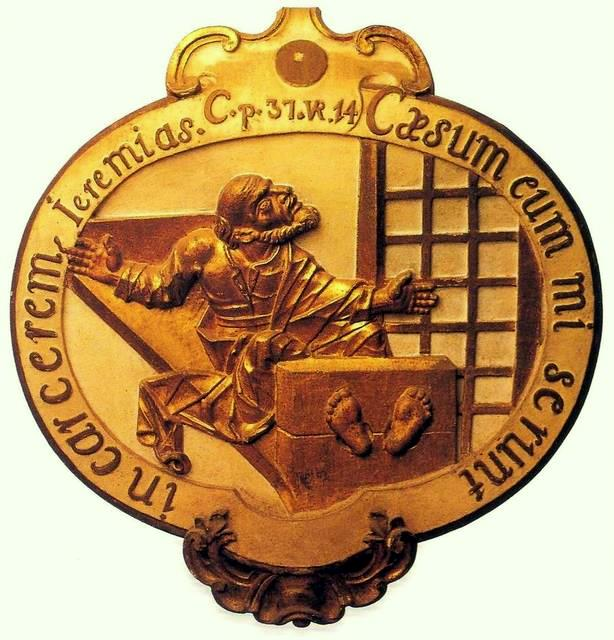 Aleijadinho (1730-1814) - Os sofrimentos do profeta Jeremias - madeira entalhada e pintada - Minas Gerais, século XVIII. Acervo do Museu Afro Brasil (São Paulo, Brasil)